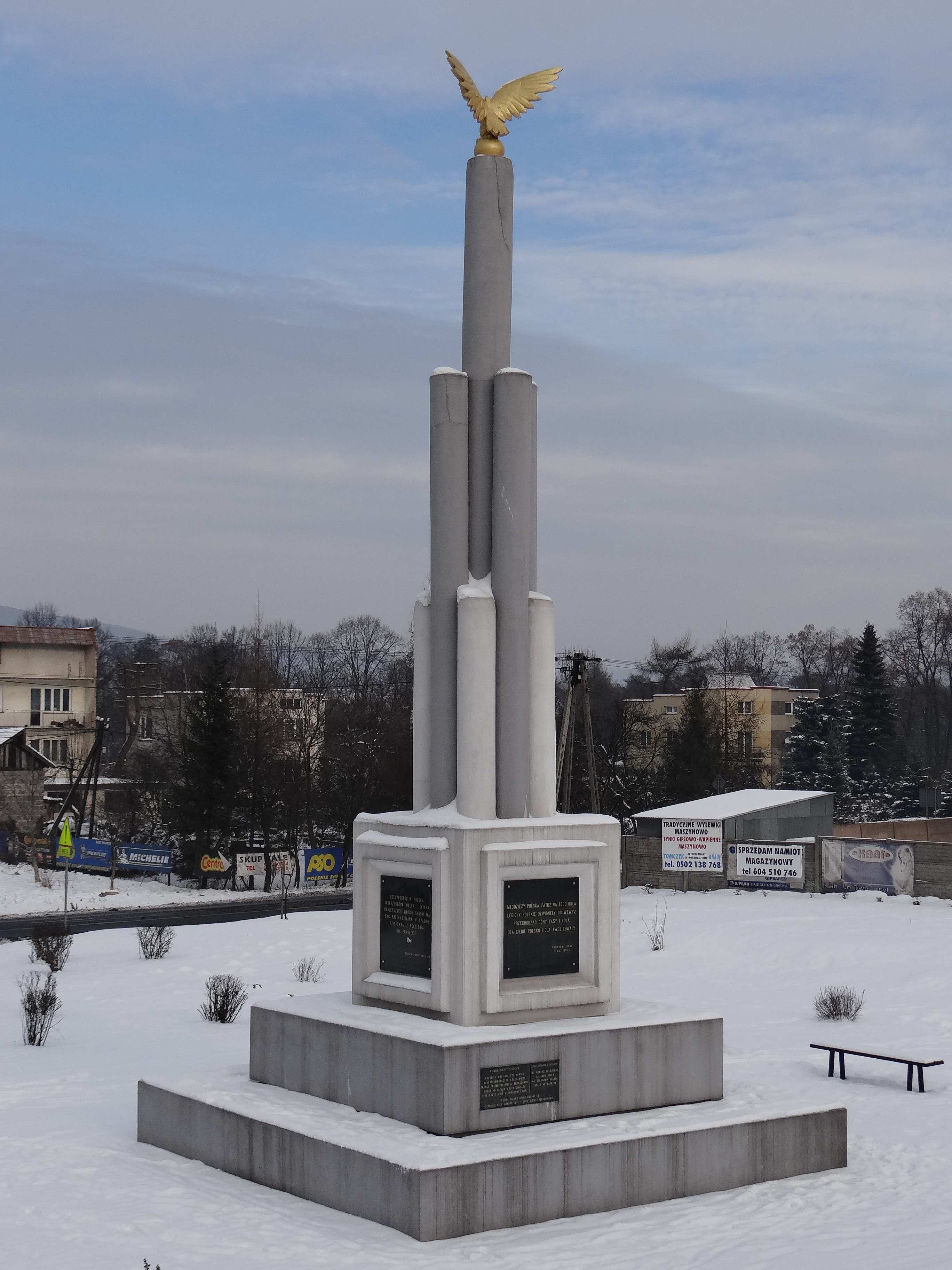 Powiat krakowski. Nawojowa Góra. Pomnik niepodległości.